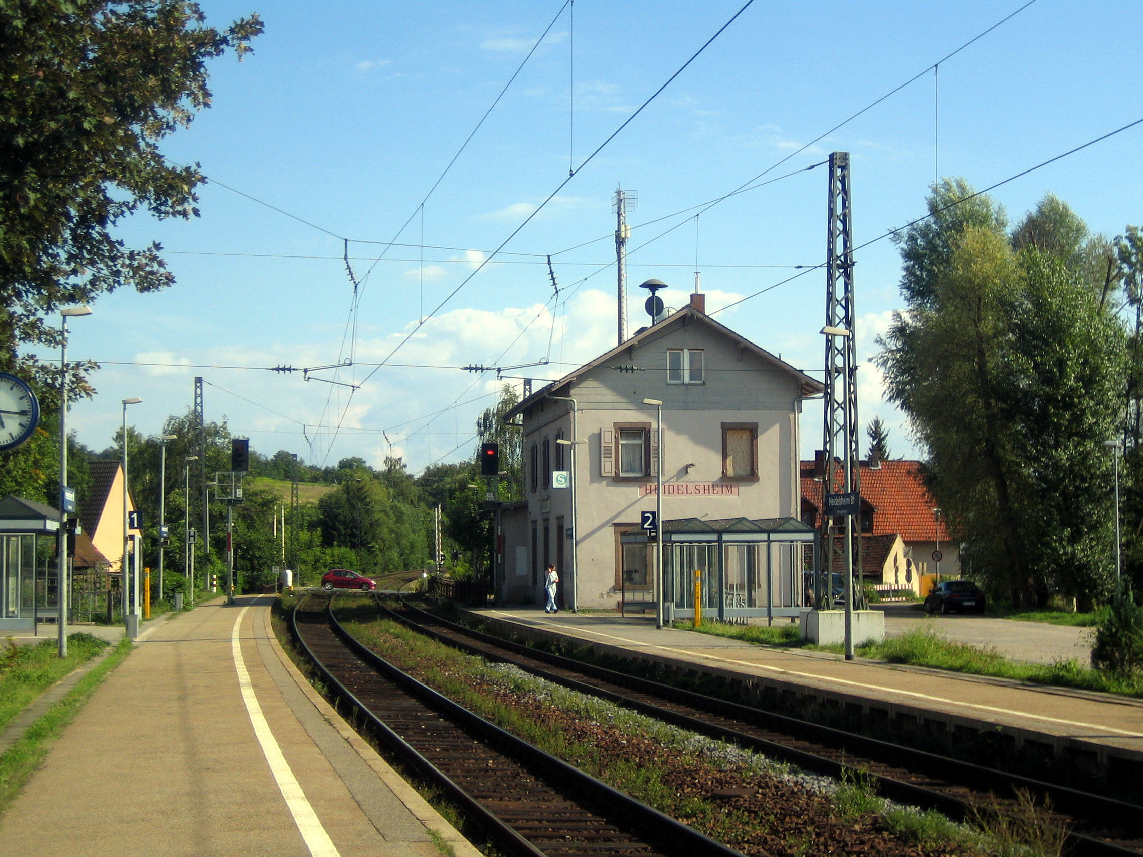 Bf. Heidelsheim